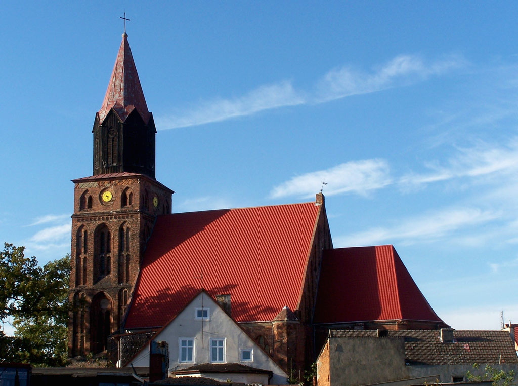 Kościół parafialny p.w. Matki Boskiej Częstochowskiej w Maszewie